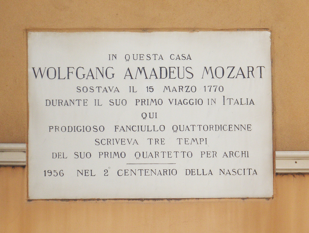 Lapide commemorativa posta su un edificio in corso Giuseppe Mazzini a Lodi.